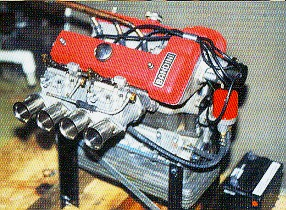 Motore Bandini 750 c.c. tratta da Libro: Bandini (storia della vita e automobili di Ilario Bandini)